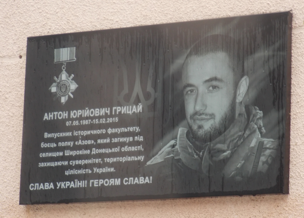 Меморіальна дошка А.Ю. Грицаю. Полтава.